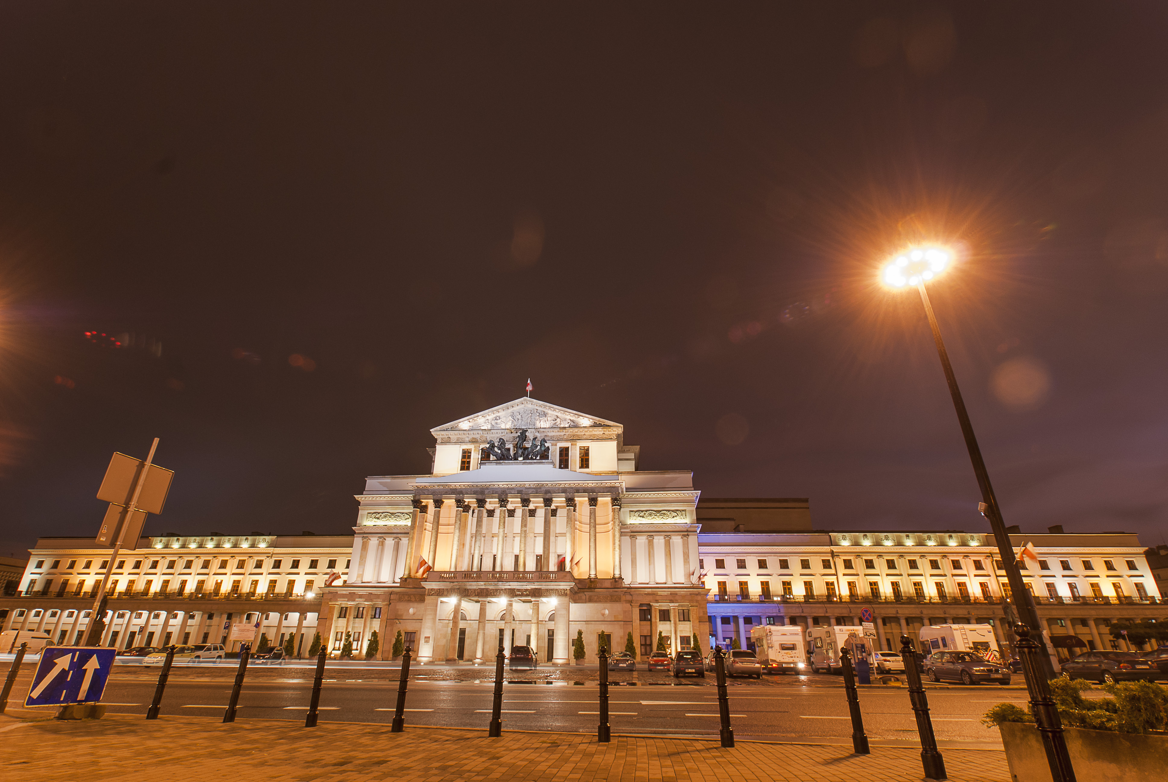 Plac teatralny w Warszawie